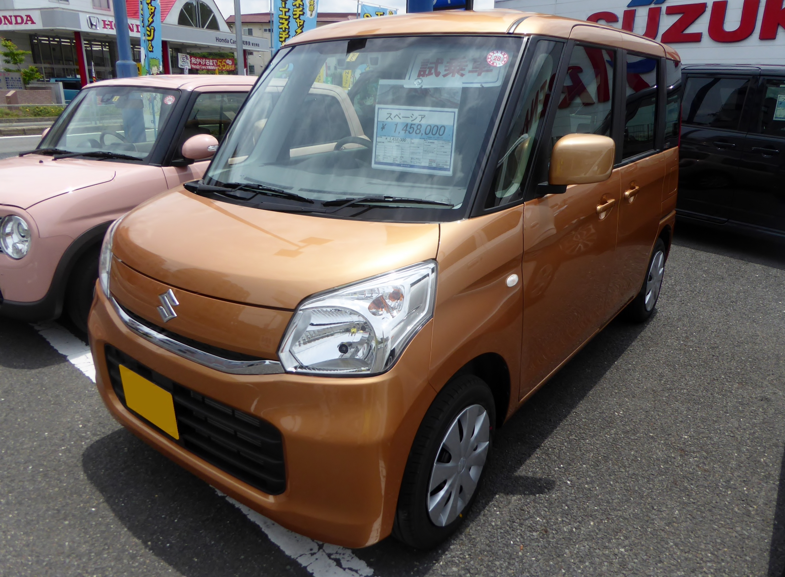 DAA-MK42S型スズキ・スペーシアXをフロントから撮影。